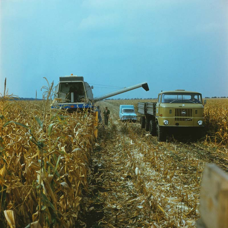 Rascani district, Moldova.